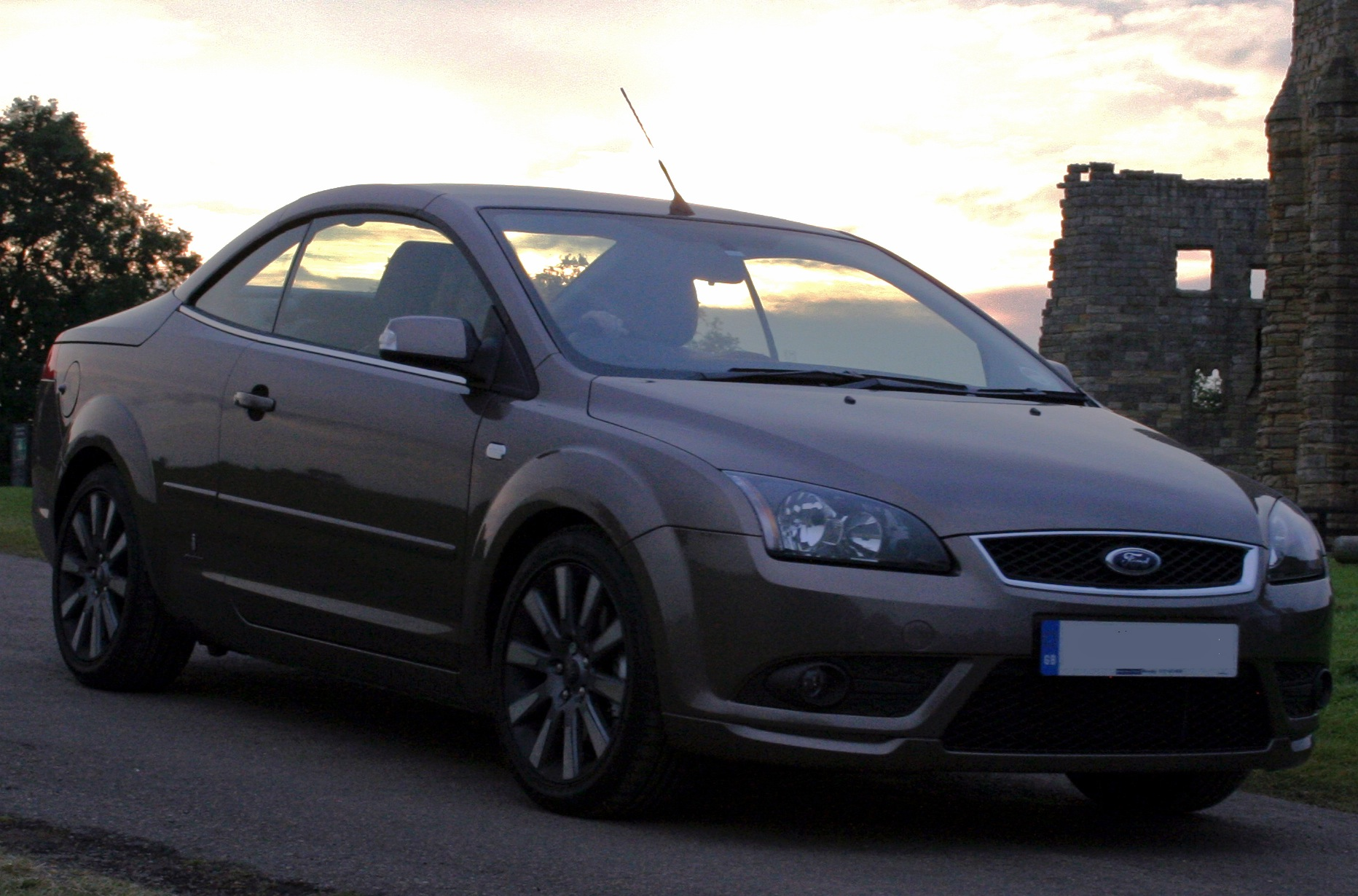 CC2